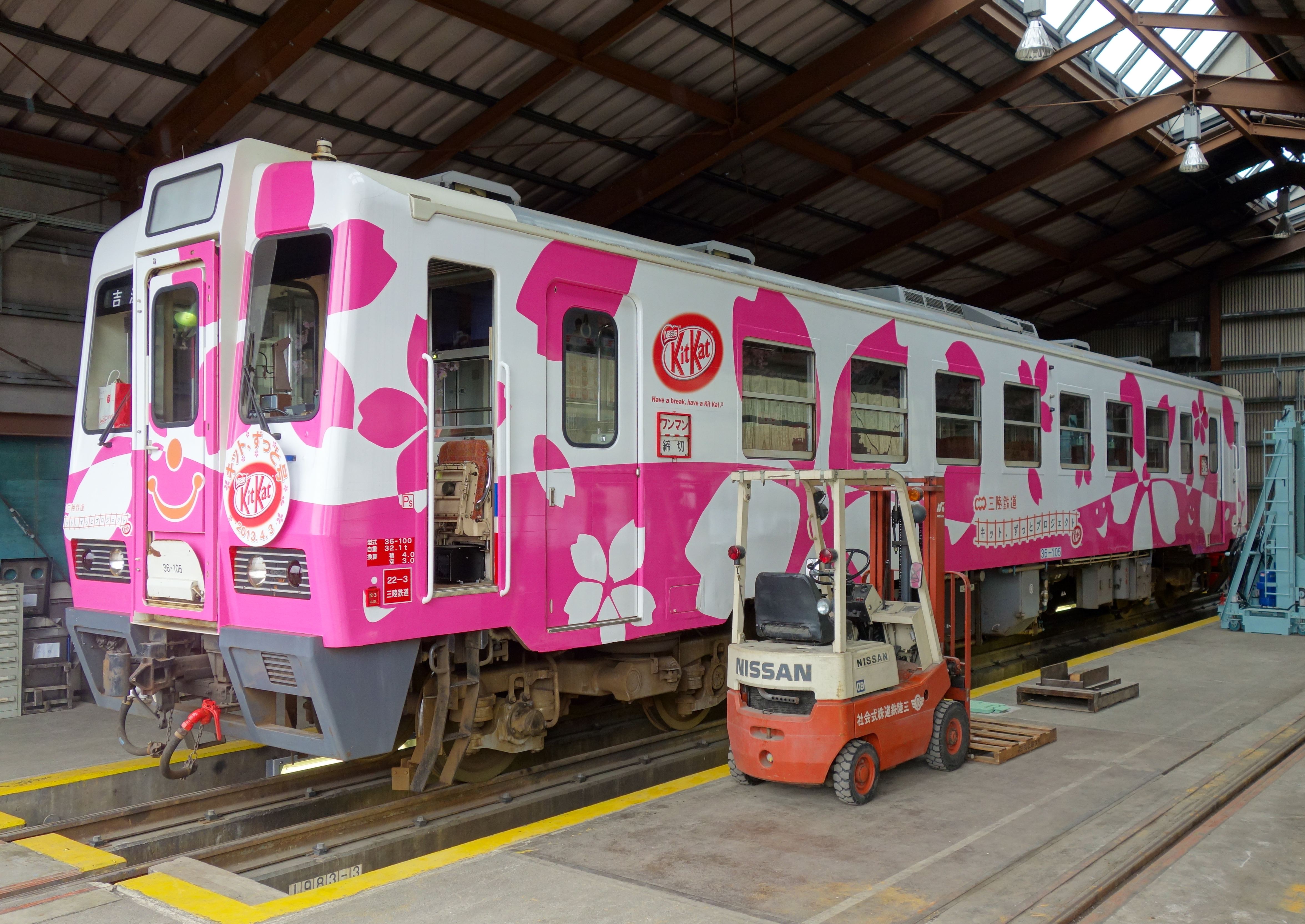 三陸鉄道 36-105 「キット、ずっと2号」（奇跡の車両） （南リアス線運行本部検修庫、大船渡市盛町木町4-4、2013年6月30日）